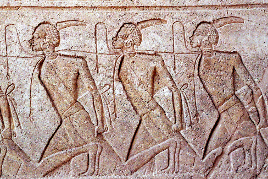 Abu-Simbel temple